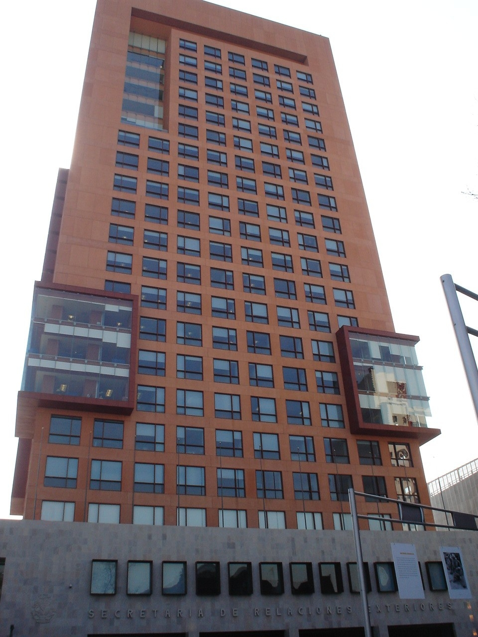 NUEVAS OFICINAS CENTRALES DE LA S. R. E.